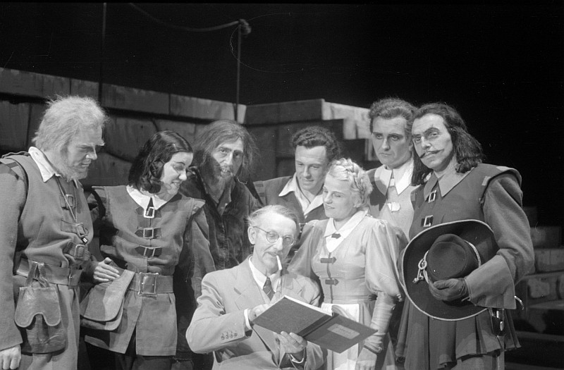 Original image description from the Deutsche Fotothek Szenenbilder